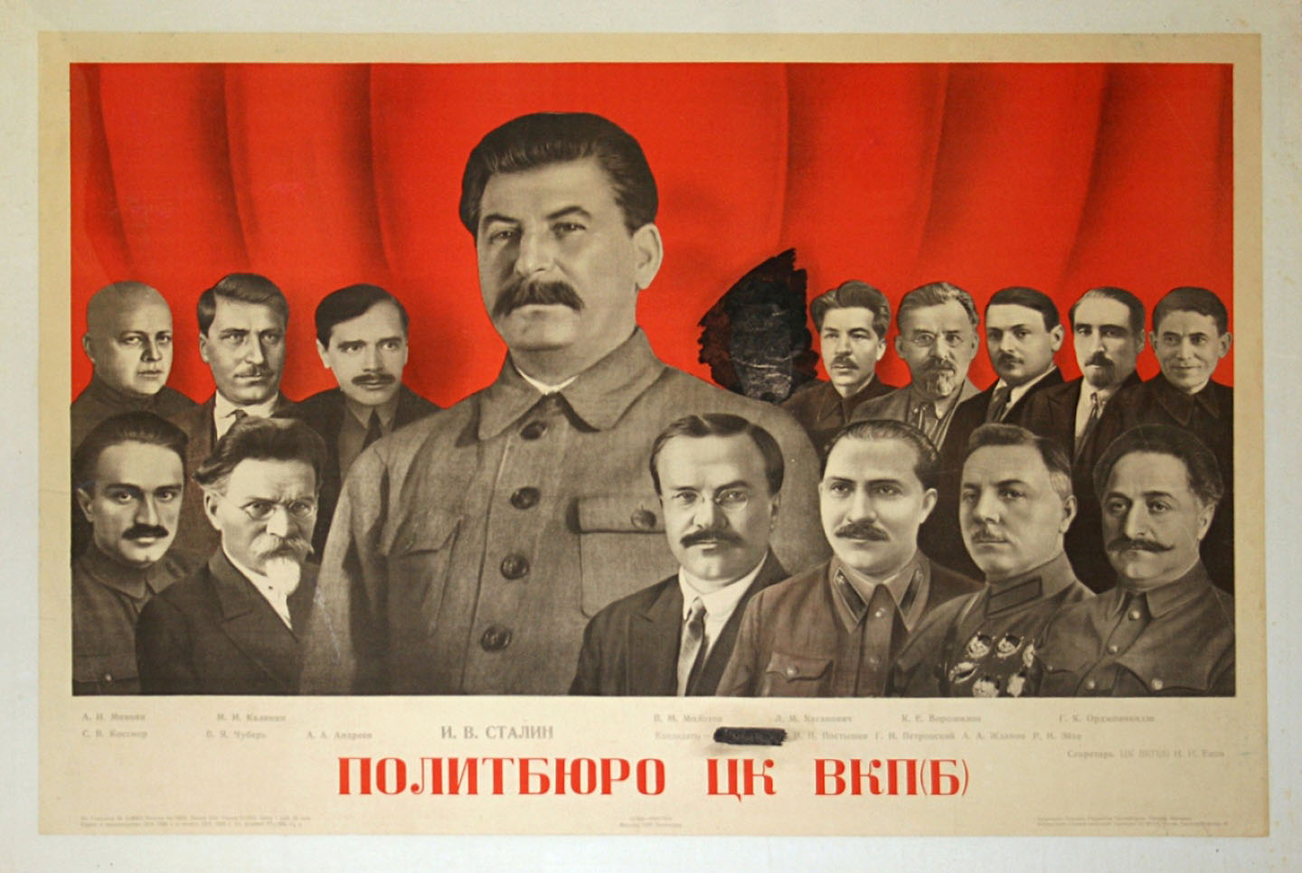 Политбюро ЦК ВКП(б)